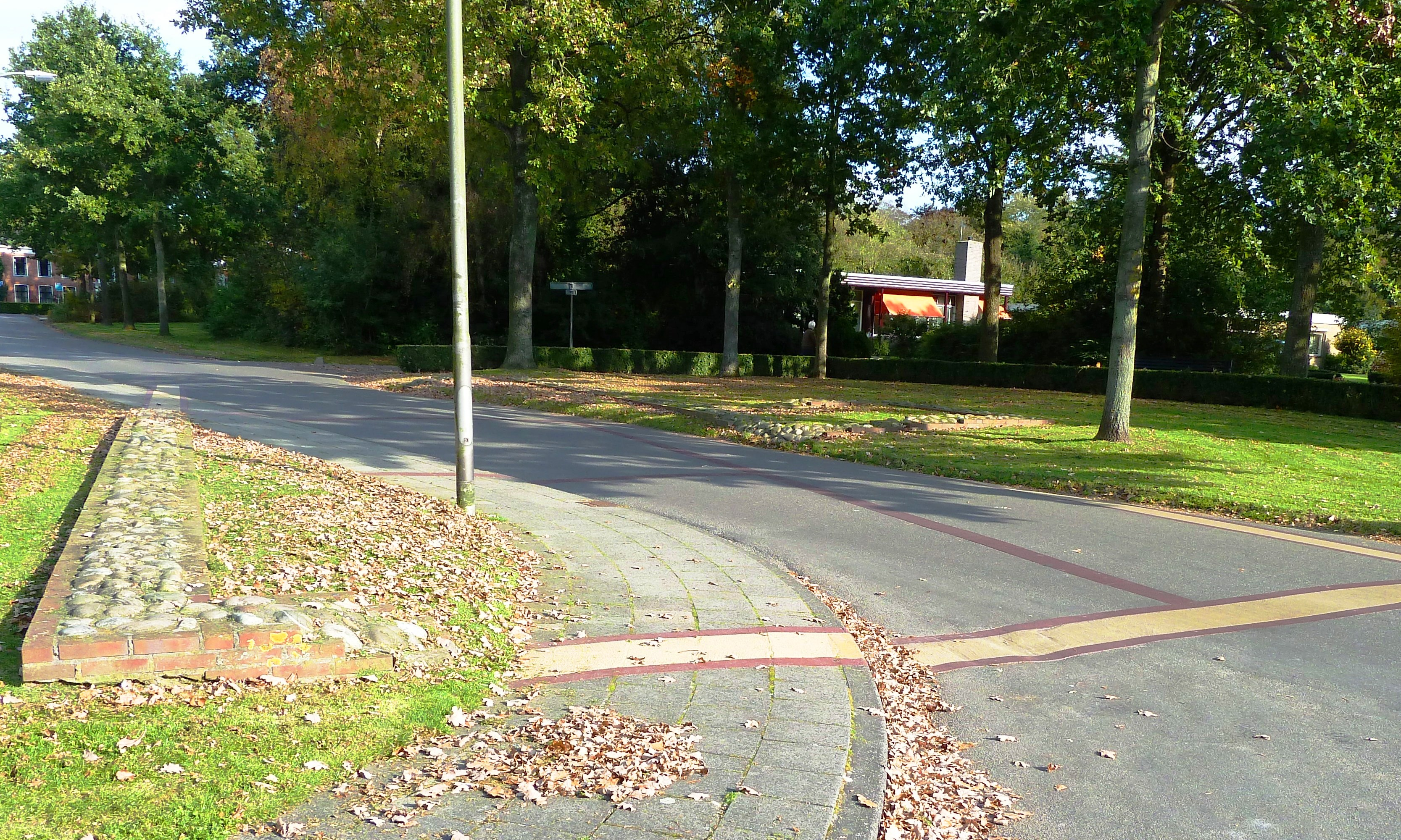 Contouren van de vroegere Hanckemaborg aan de Hanckemalaan van Zuidhorn. Geplaatst in 1994.